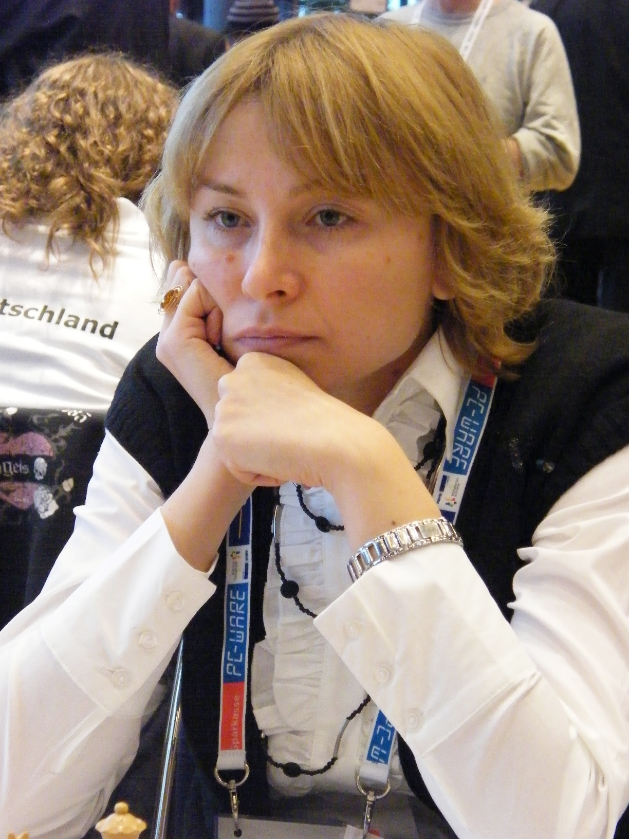 Svetlana Petrenko bei der 38. Schacholympiade in Dresden 2008